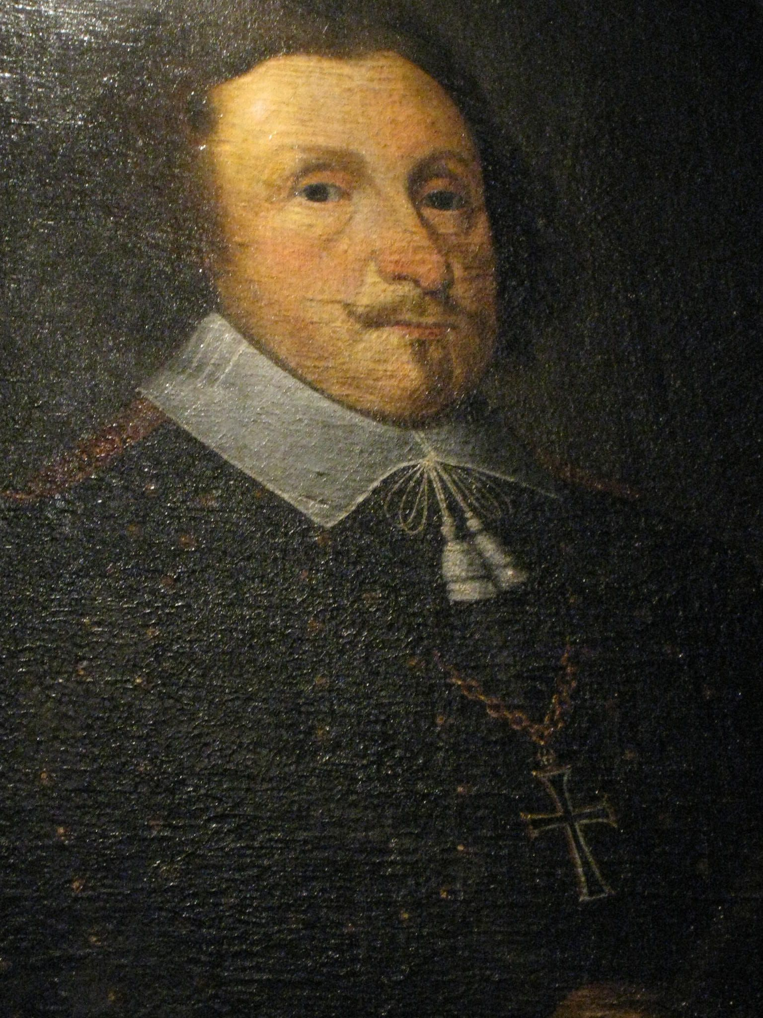 Godfried Huyn van Geleen, landcommandeur Alde Biezen